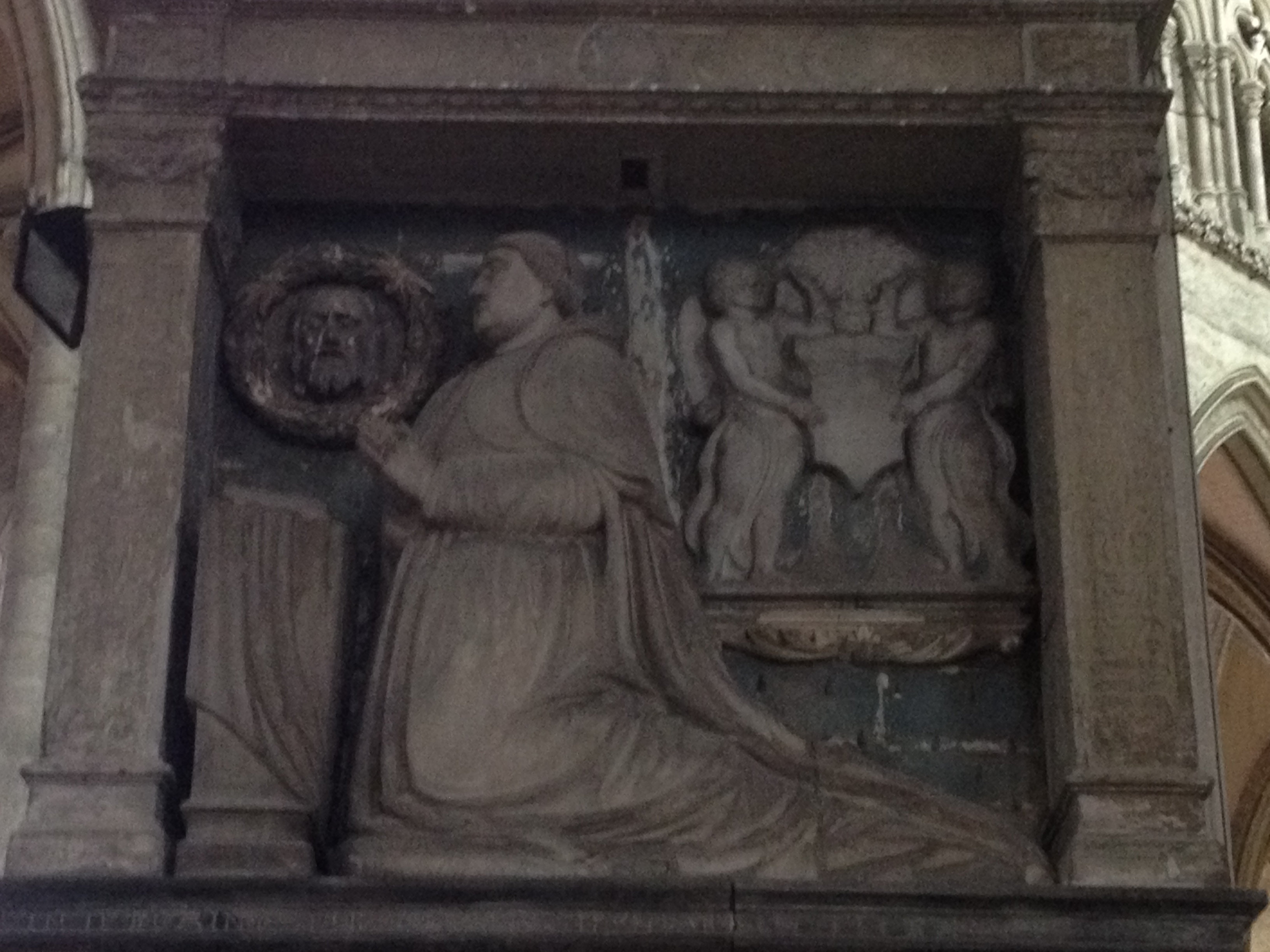 Orant de Charles de Hémard de Denonville.